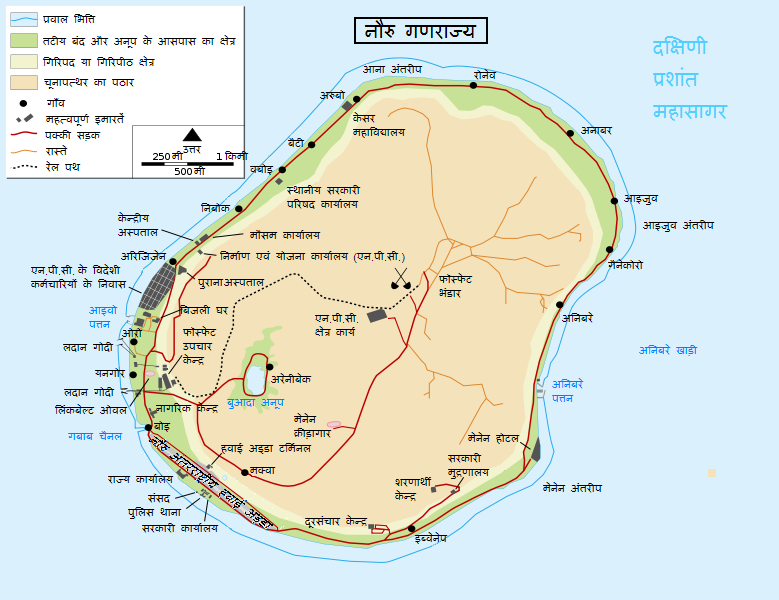 Nauru map hindi